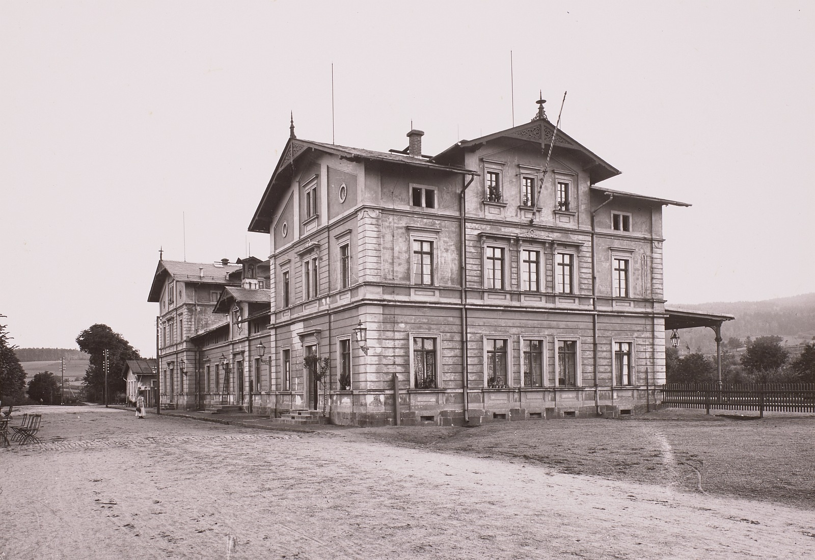 Hornjoserbsce: Dwórnišćo w Budestecach wokoło 1905